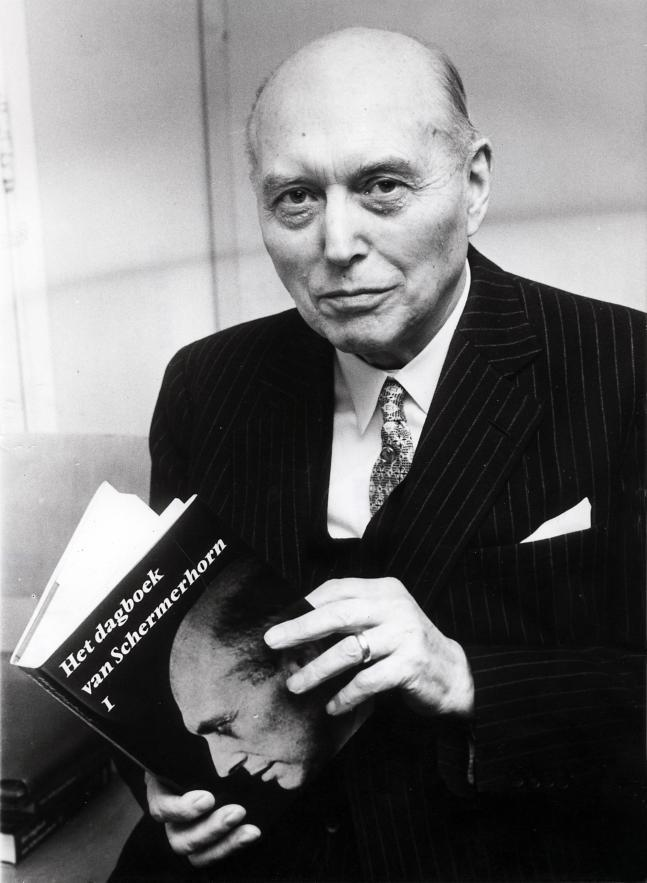 Schermerhorn , W. (PvdA). Presentatie van het boek "Het dagboek van Schermerhorn" van de hand van oud-premier dr. ir. W. Schermerhorn, in het Haagse Nieuwspoort. Schermerhorn neemt het eerste exemplaar in ontvangst. Nederland, Den Haag, 20 november 1970.